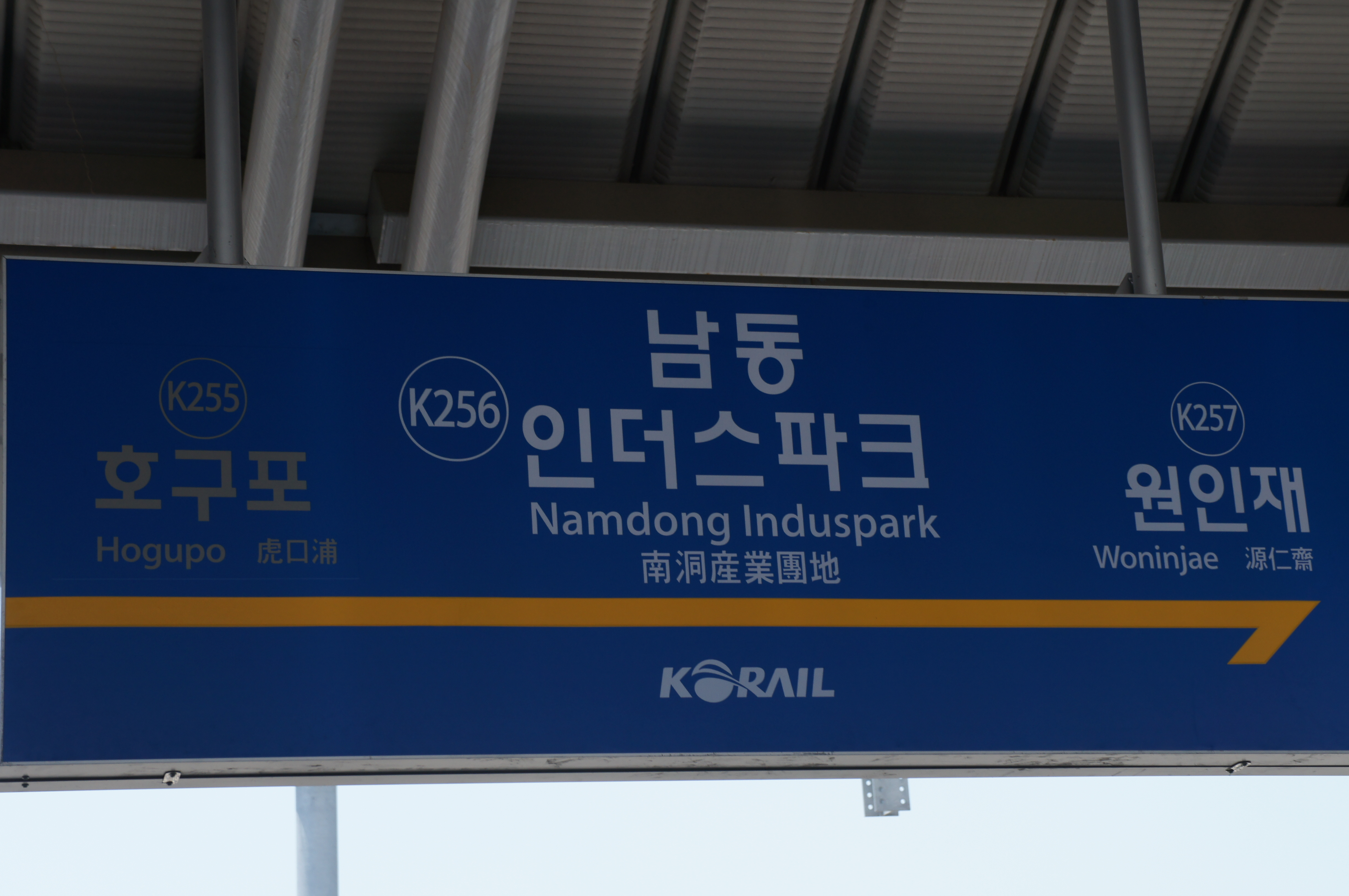 남동인더스파크역 역명판